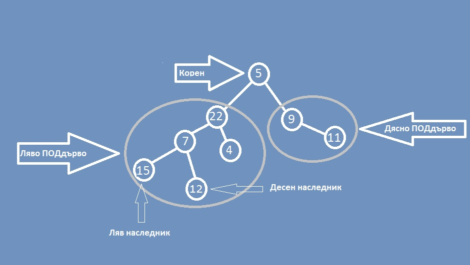 Графика на дърво(структора от данни)